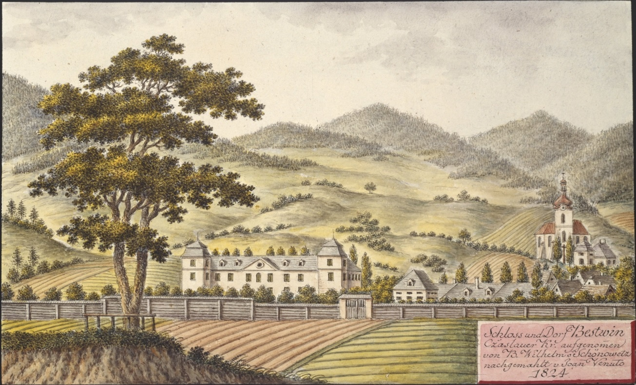 Zámek Běstvina. Schloss und Dorf Bestwin Czaslauer Kr. aufgenommen von B. Wilhelm Schönowetz nachgemahlt v. Joan Venuto 1824